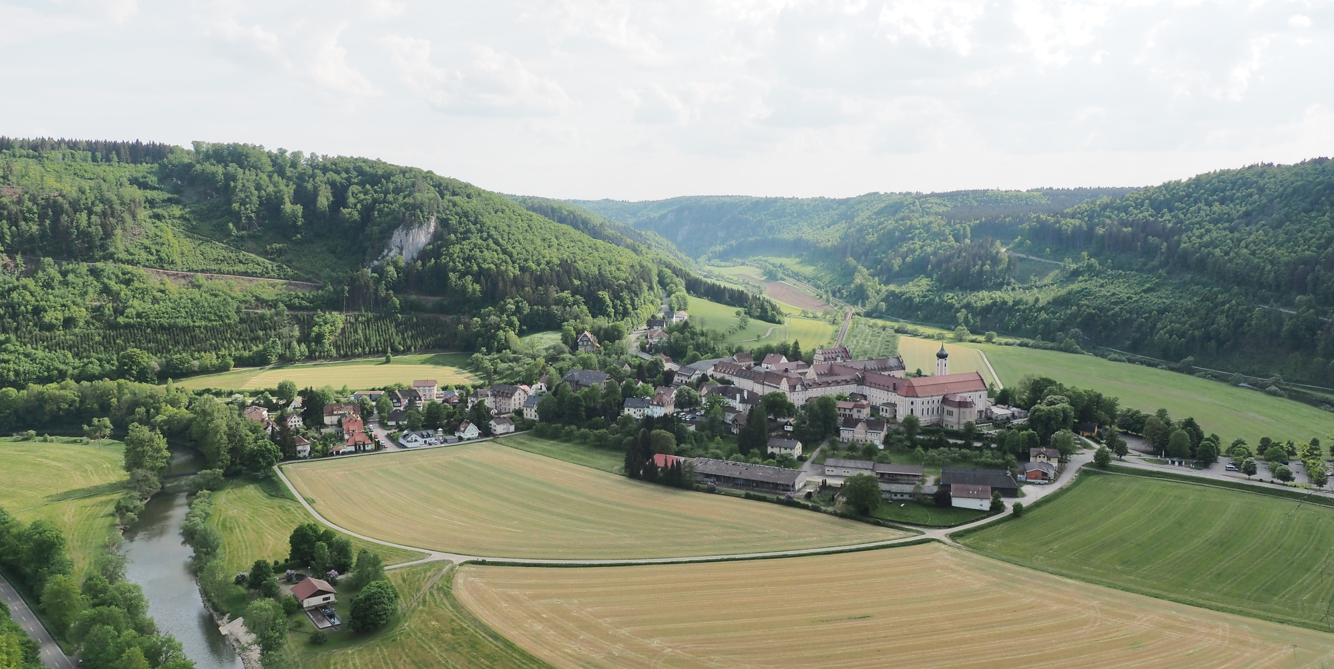 Beuron - Nord-Ost-Ansicht; links die Donau, rechts die Benediktiner-Erzabtei